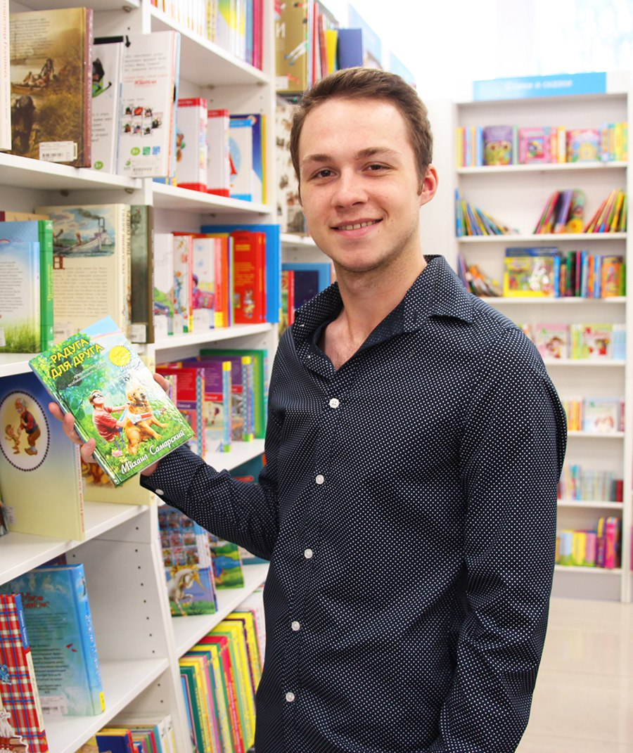 Самарский Михаил Александрович